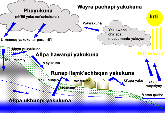 Runa Simi: Yaku muyuriy